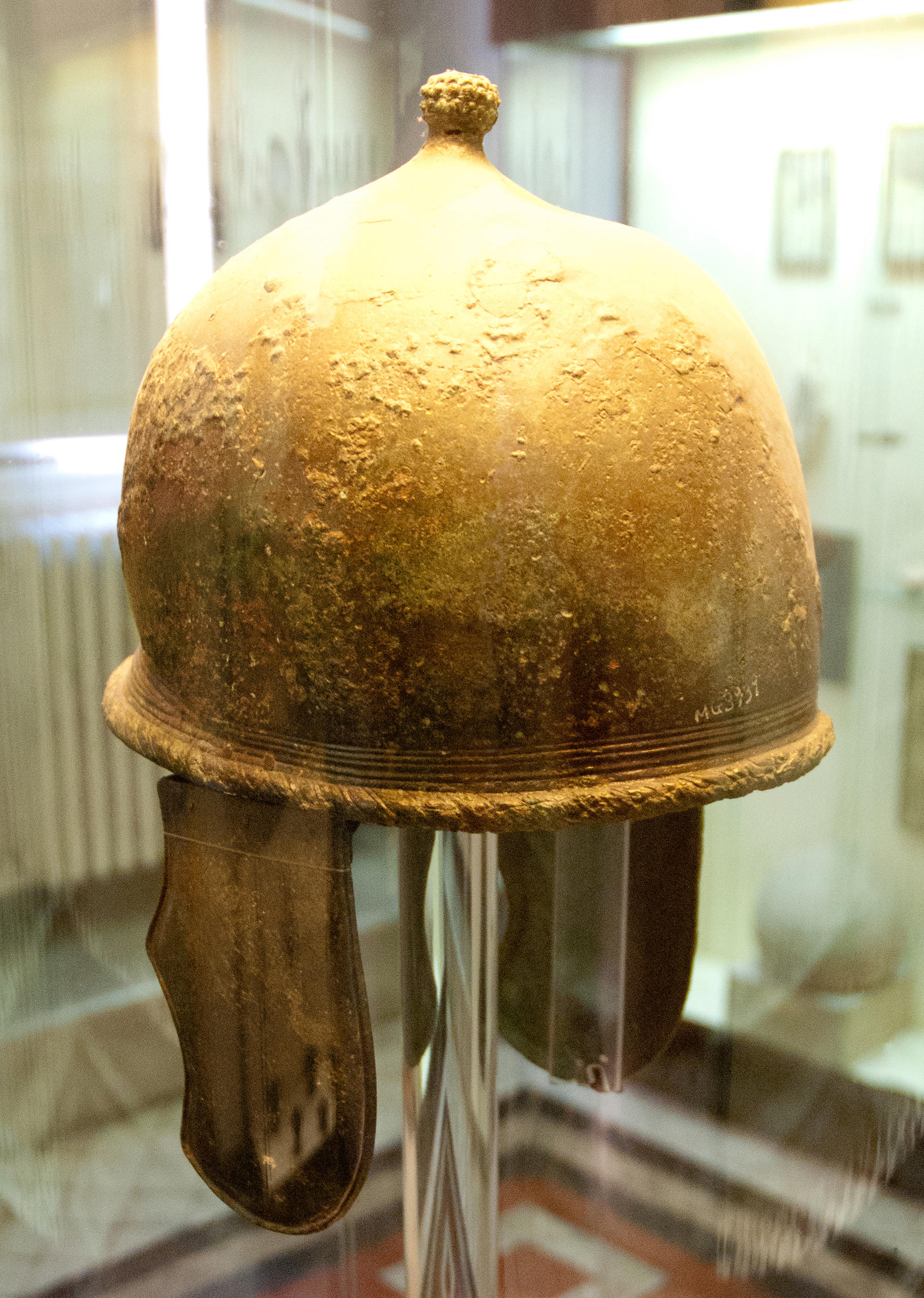 Früher Montefortino-Helm A, aufgenommen 2010 im Etruskische Museum der Stadt Volterra, Toscana, Italien.